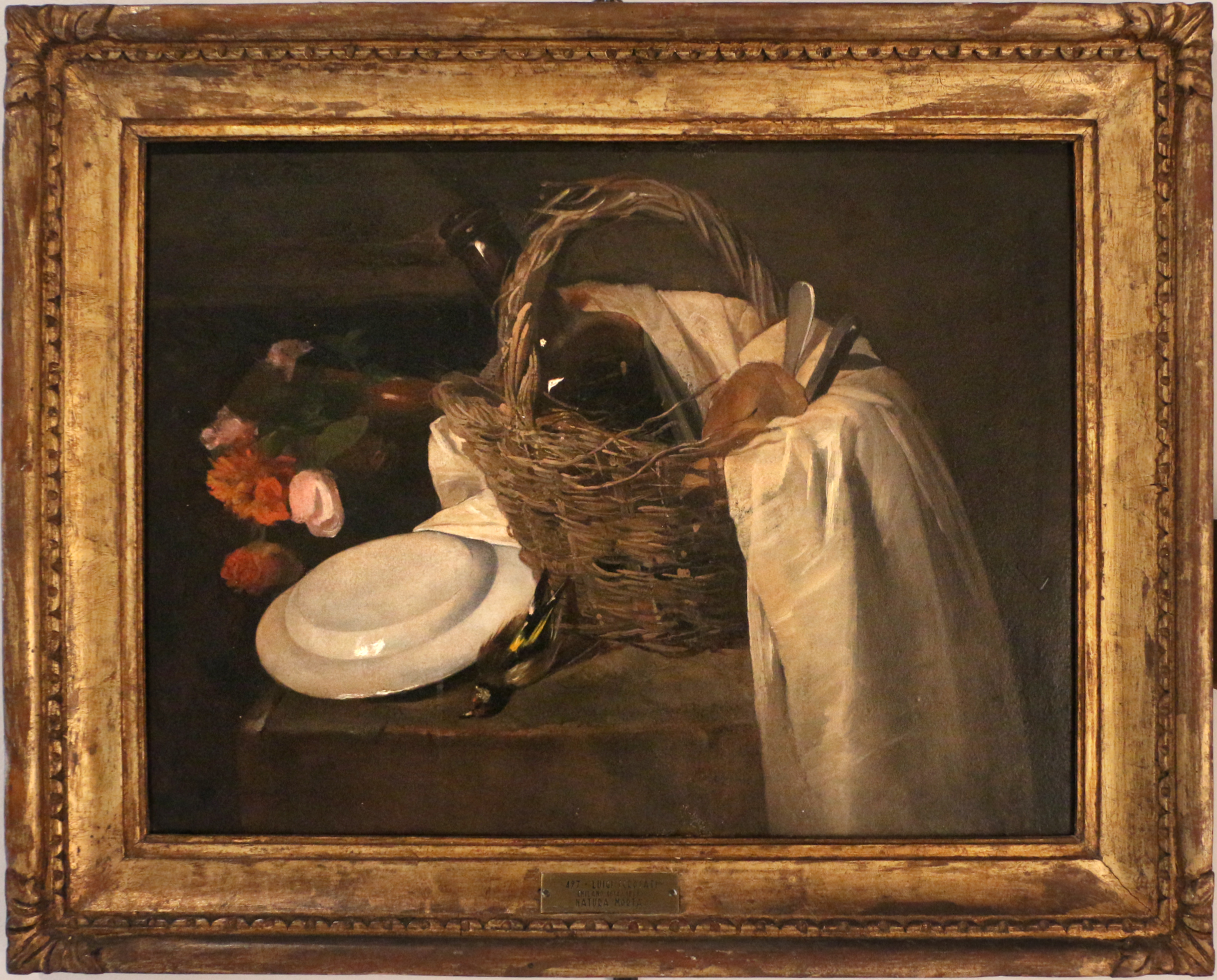 Palazzo Ala Ponzone This is a photo of a monument which is part of cultural heritage of Italy.